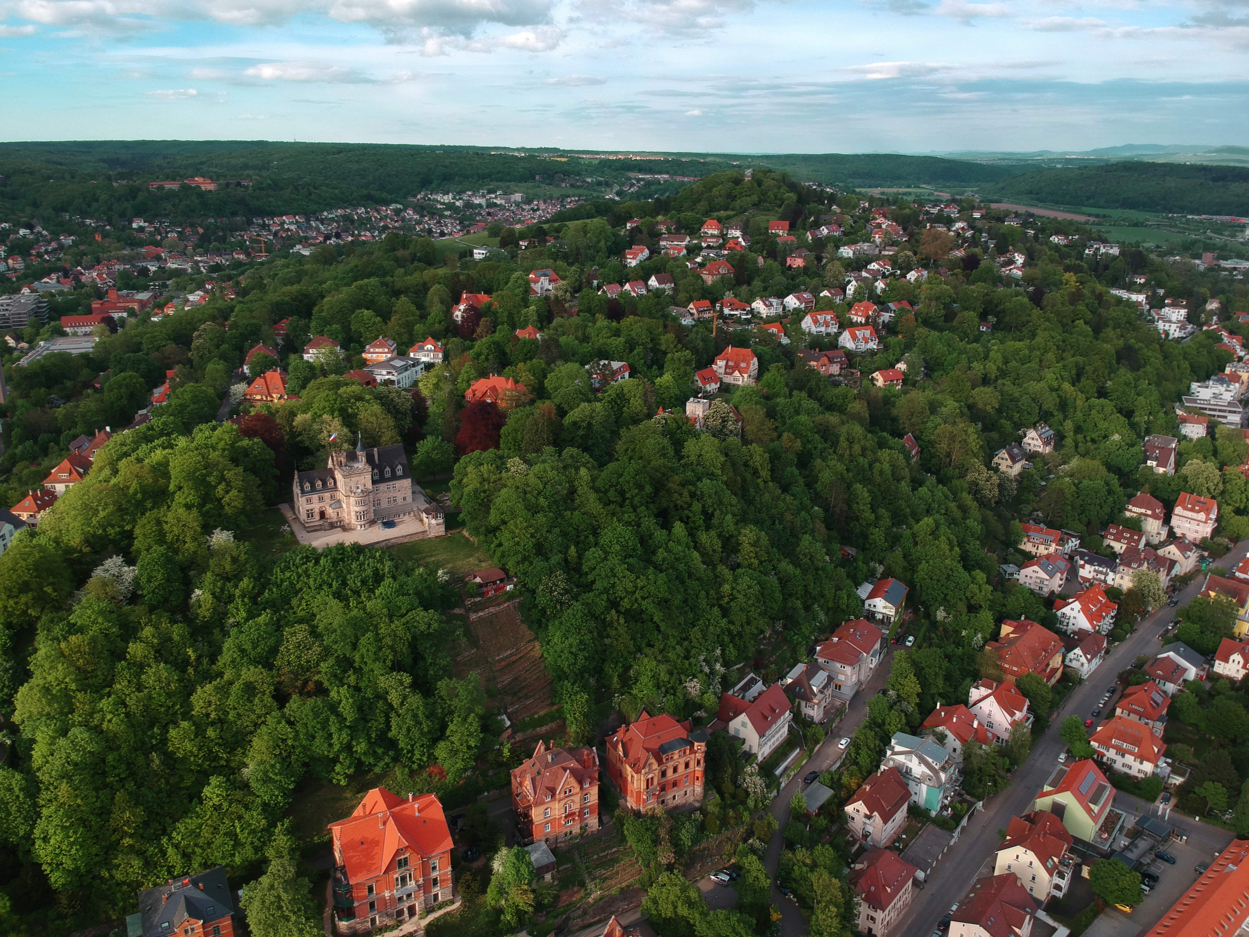 Luftbild der Südseite des Österbergs